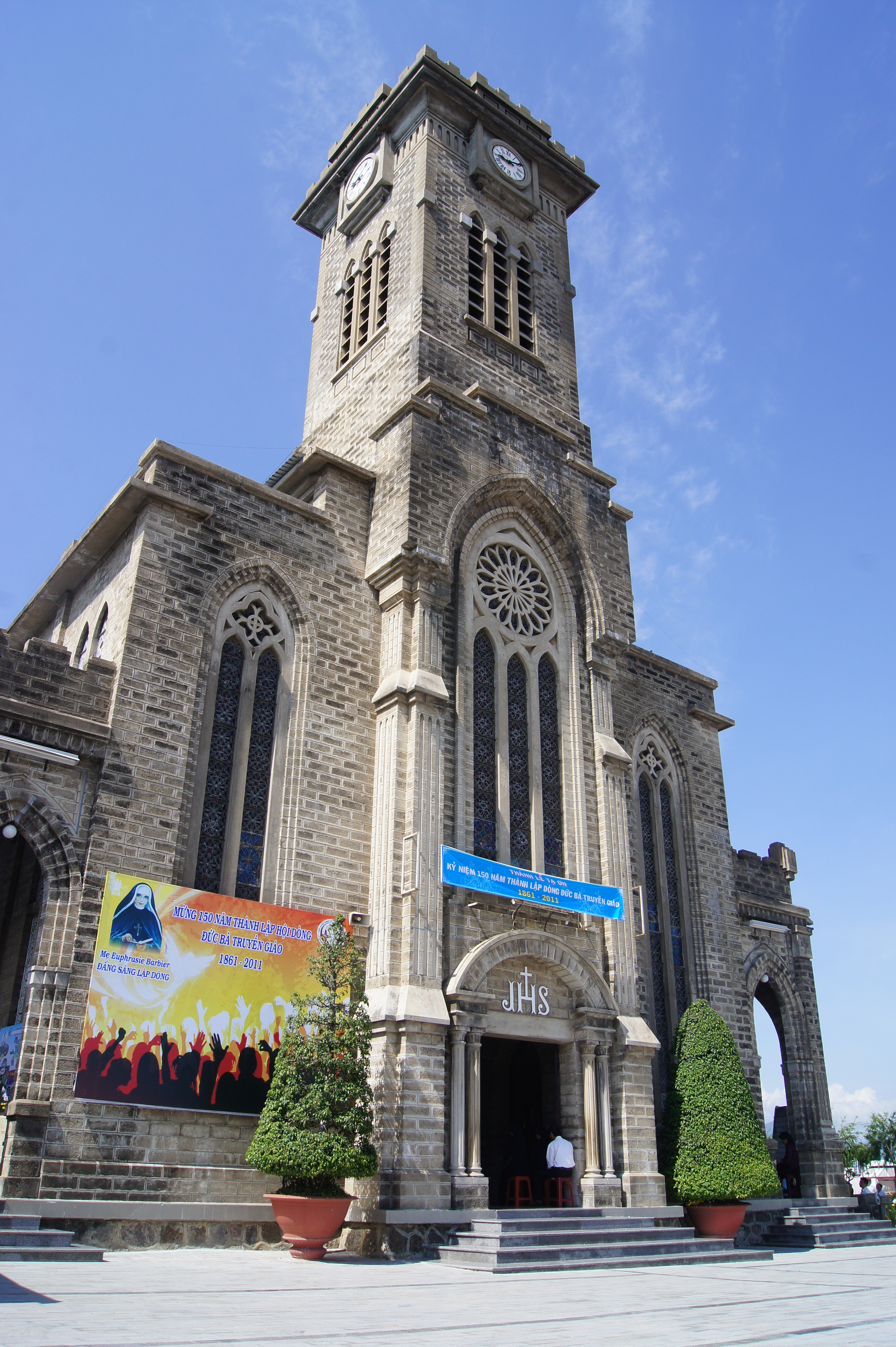 Mặt tiền nhà thờ núi Nha Trang